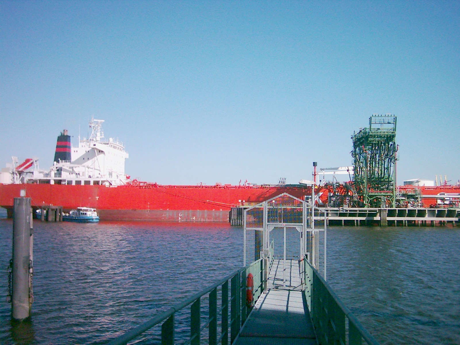 Zugang zu einer Anlegestelle, Hamburg.